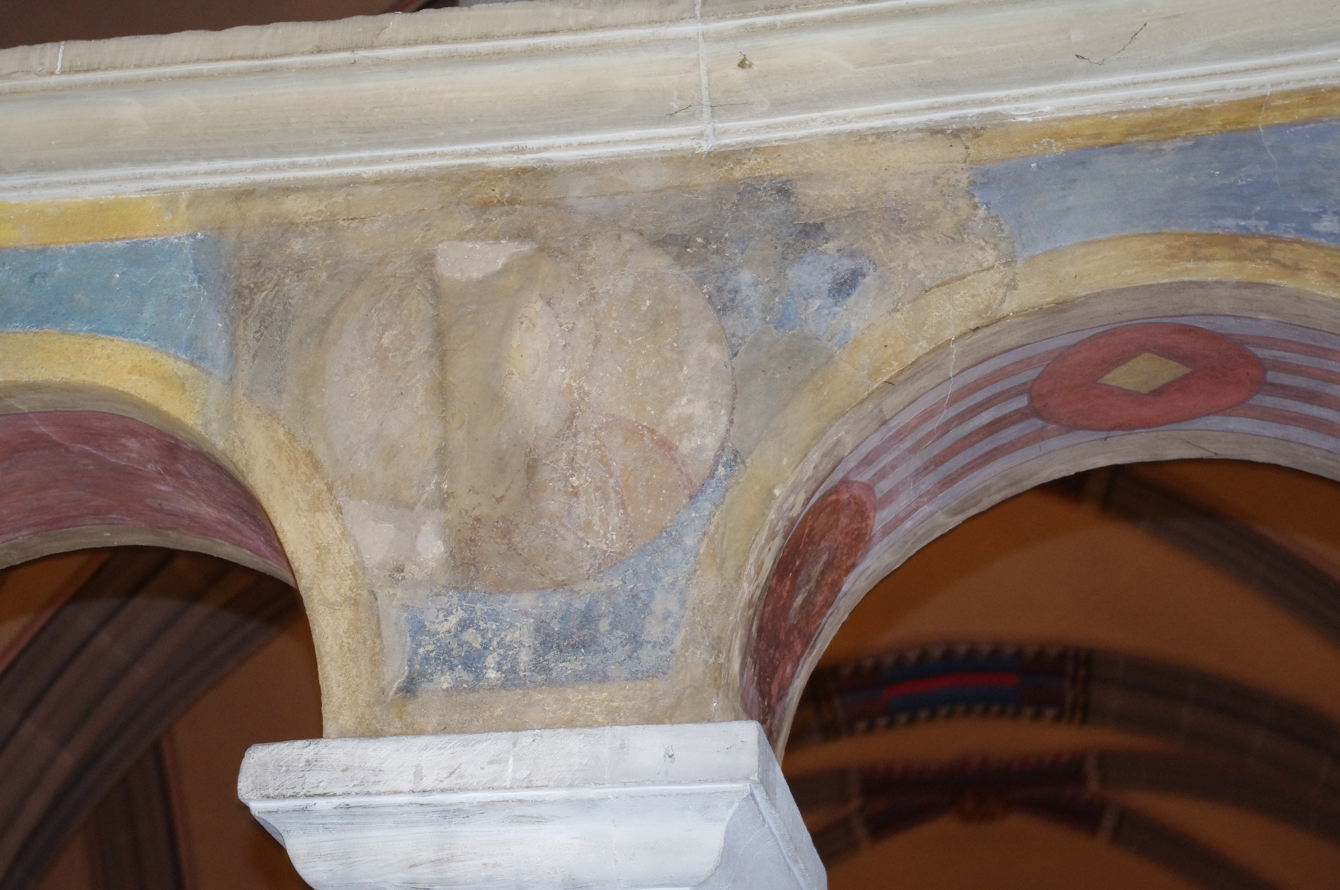 Reste ottonischer Wandmalerei im Westbau des Essener Münsters